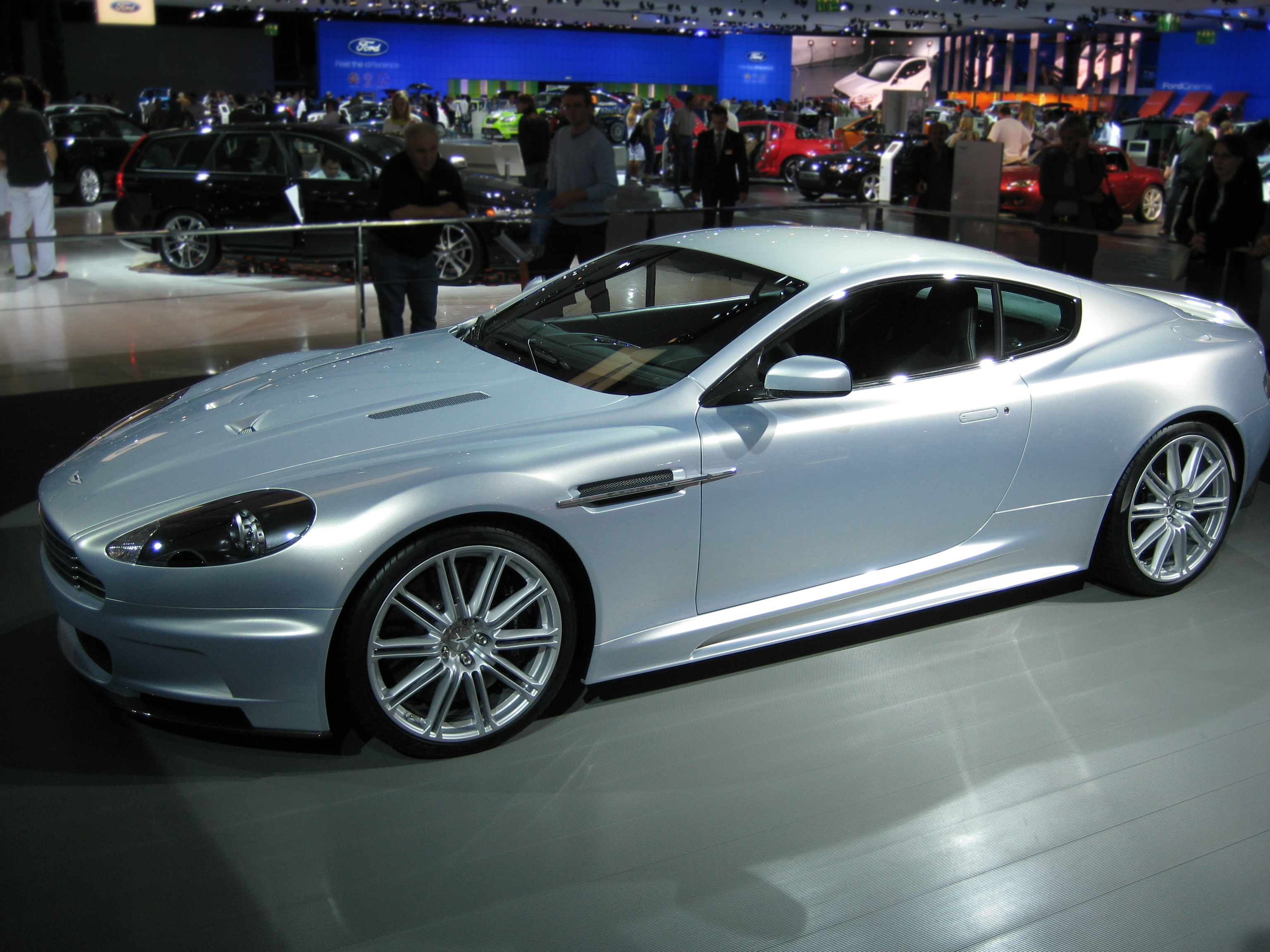 Aston Martin DBS auf der IAA 2007